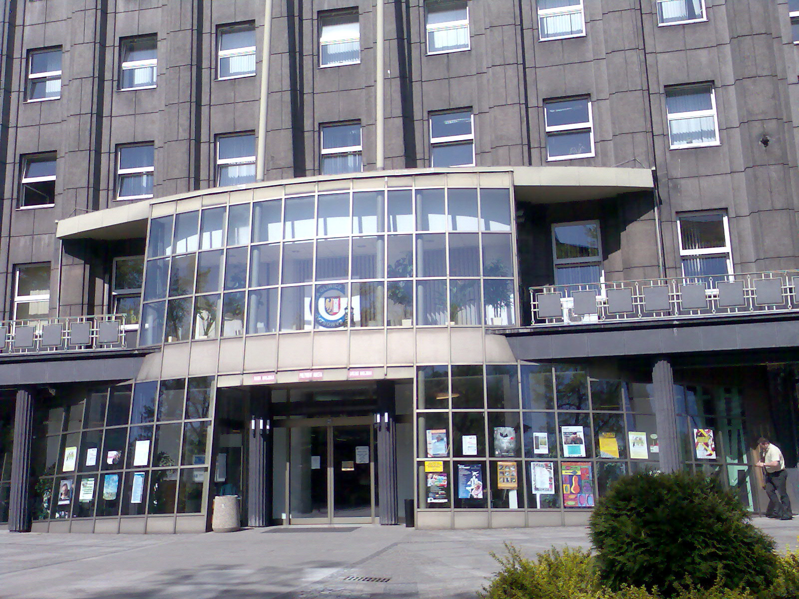 Gliwice